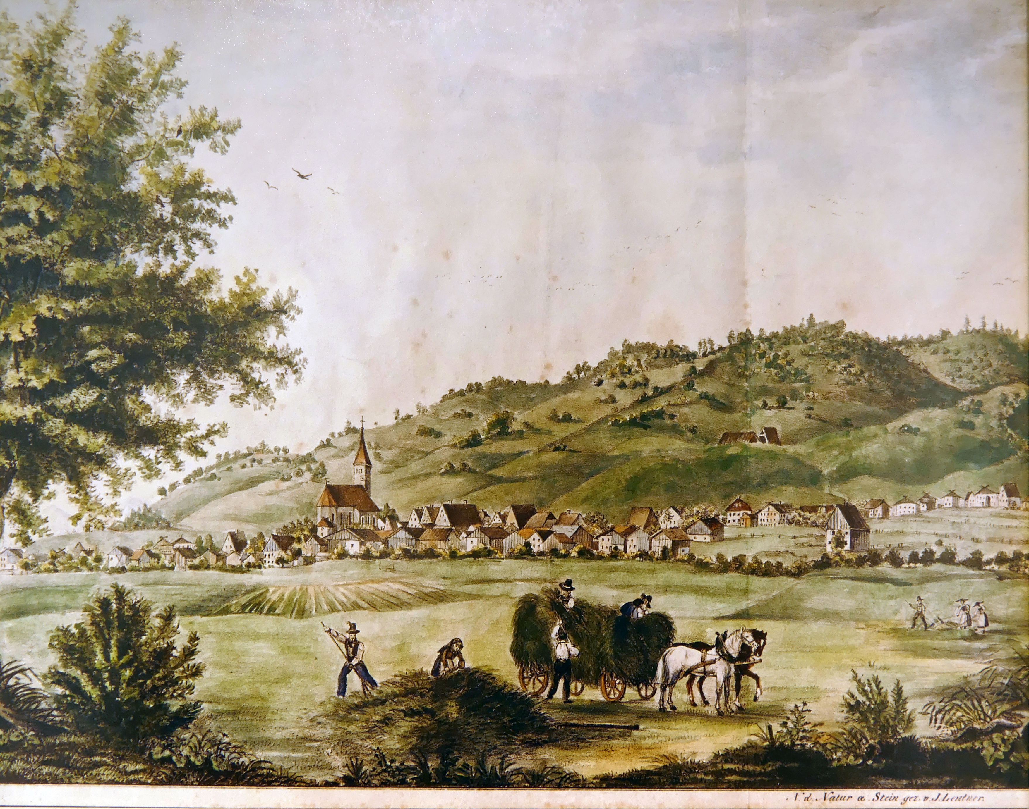 Joseph Friedrich Lentner: Peiting um 1840, handkolorierte Steinzeichnung. Museum im Klösterle, Peiting.